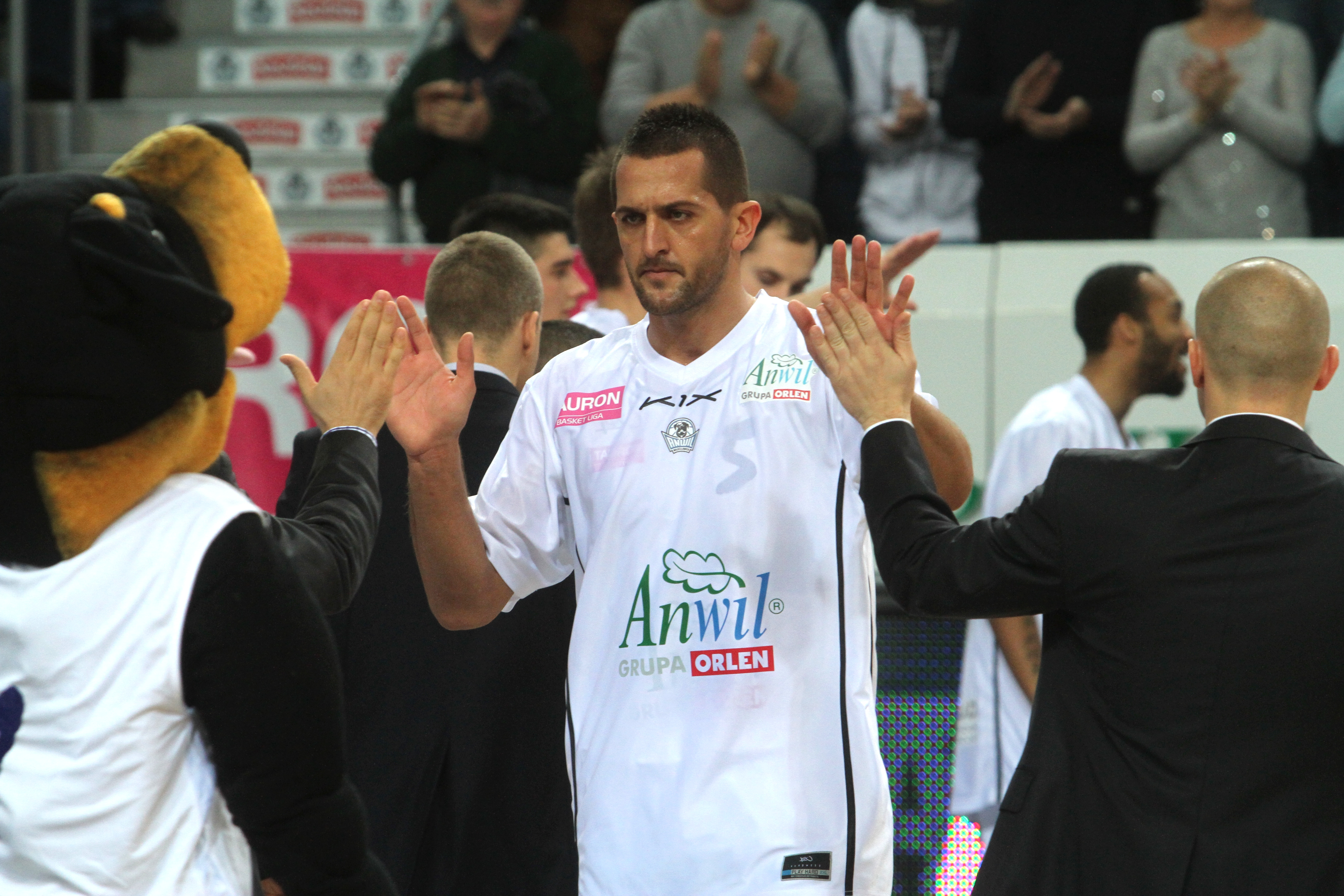 Seid Hajrić, Anwil Włocławek